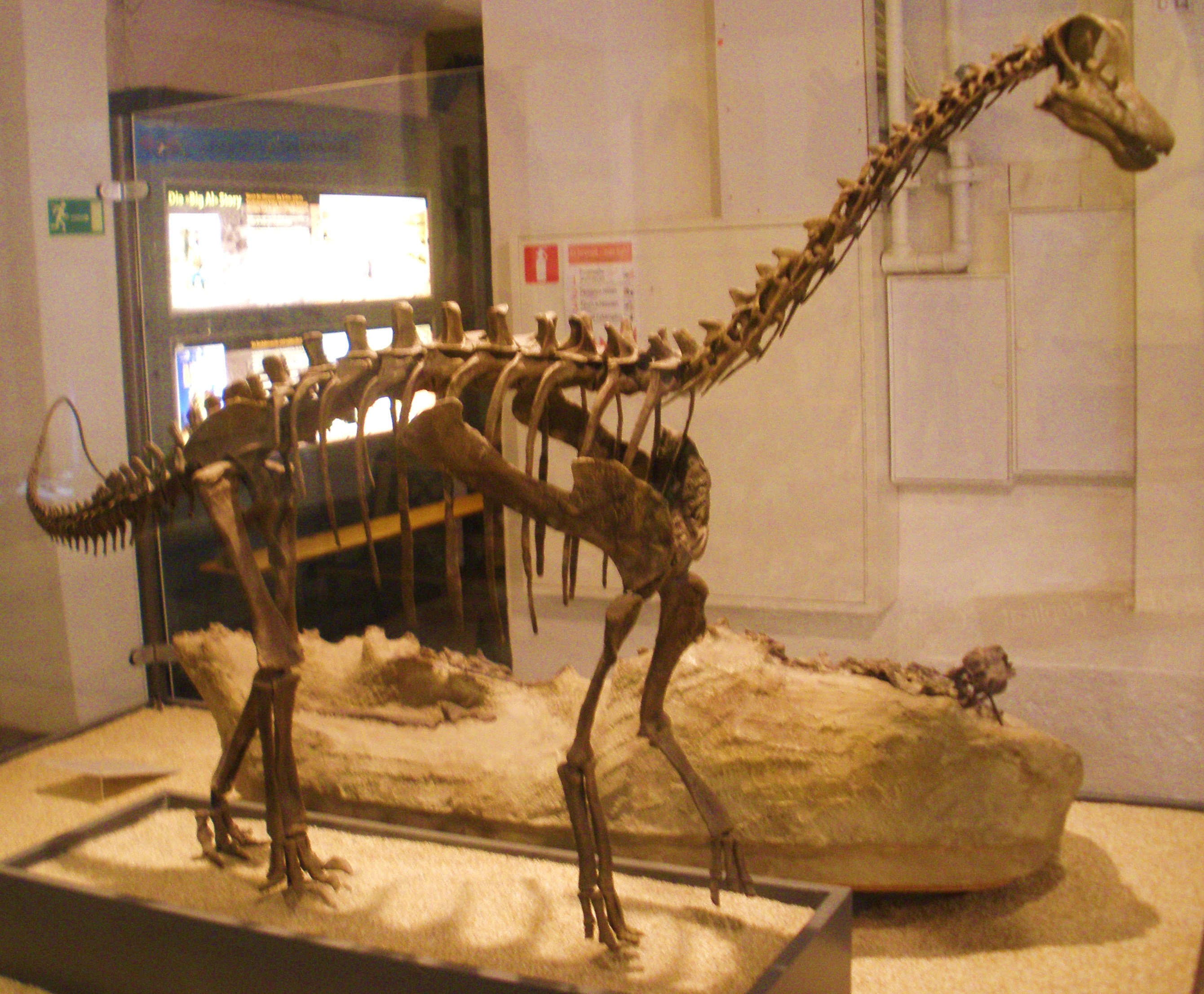 Fossil baby sauropod (Toni, specimen SMA 0009).